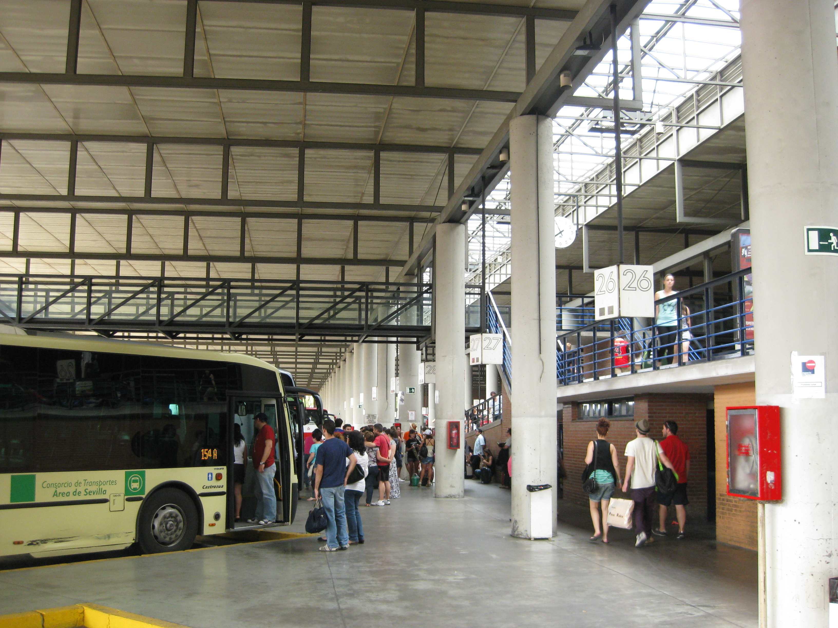 Andenes de la estación de autobuses Plaza de Armas. Mayo de 2012